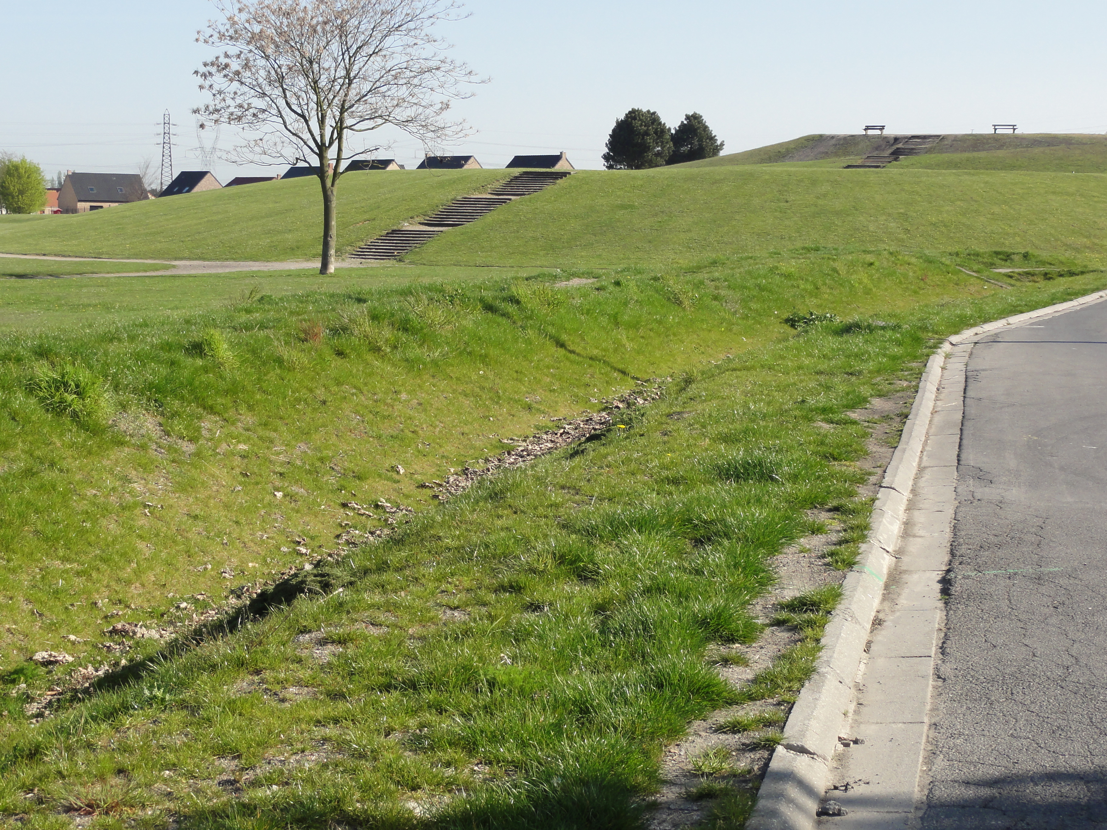 Terril n° 217 dit Archevêque, Fosse Archevêque de la Compagnie des mines d'Aniche, Aniche, Nord, Nord-Pas-de-Calais, France.